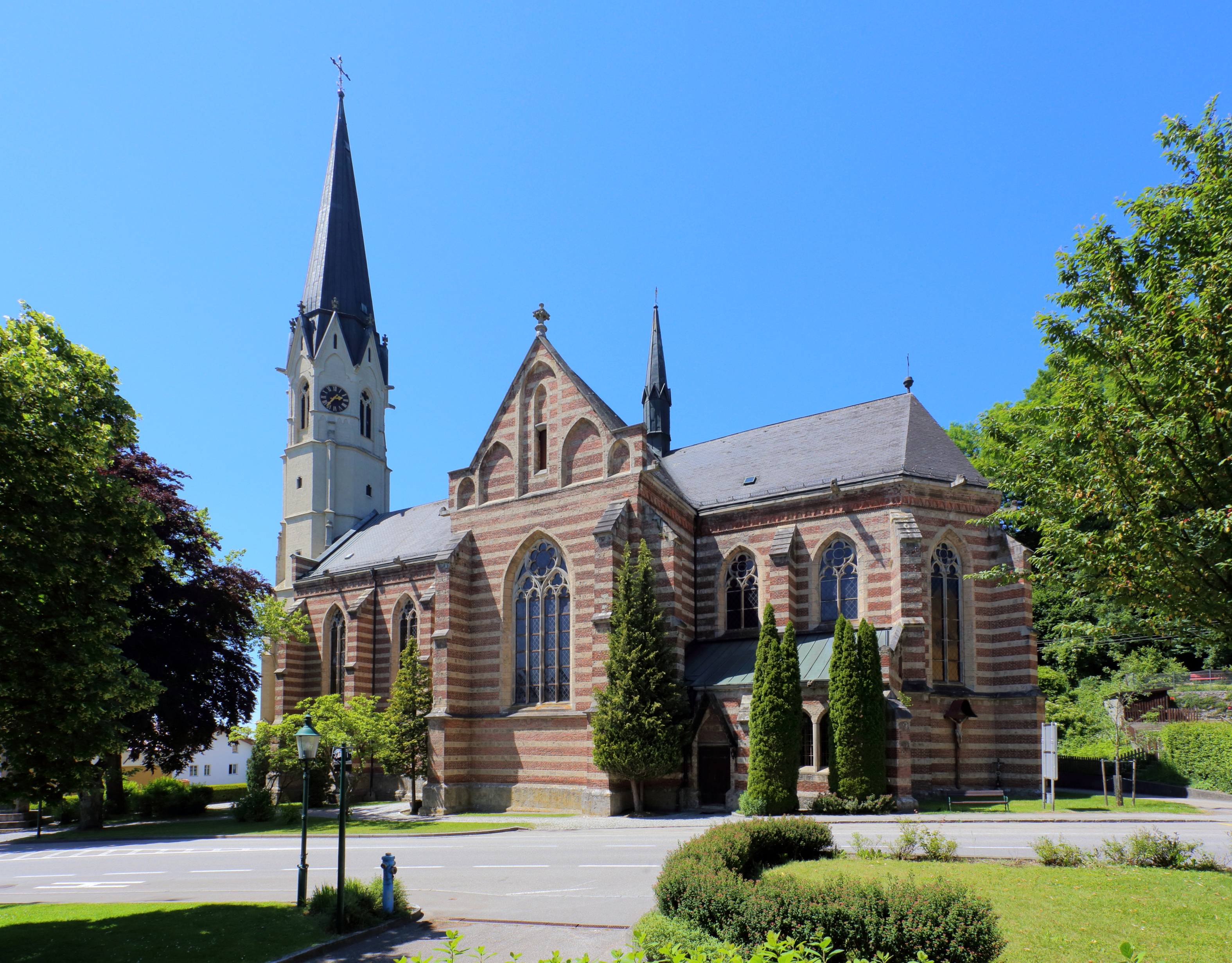 Katholische Pfarrkirche Mariä Himmelfahrt in der oberösterreichischen Marktgemeinde Mauerkirchen. Langhaus und Chor nach einem Brand im Jahr 1865 von 1867 bis 1872 in neugotischen Stil errichtet. Der vorgestellte gotische Westturm stammt aus dem Jahr 1504, wobei der neugotische Turmaufsatz im Jahr 1873 aufgesetzt wurde.